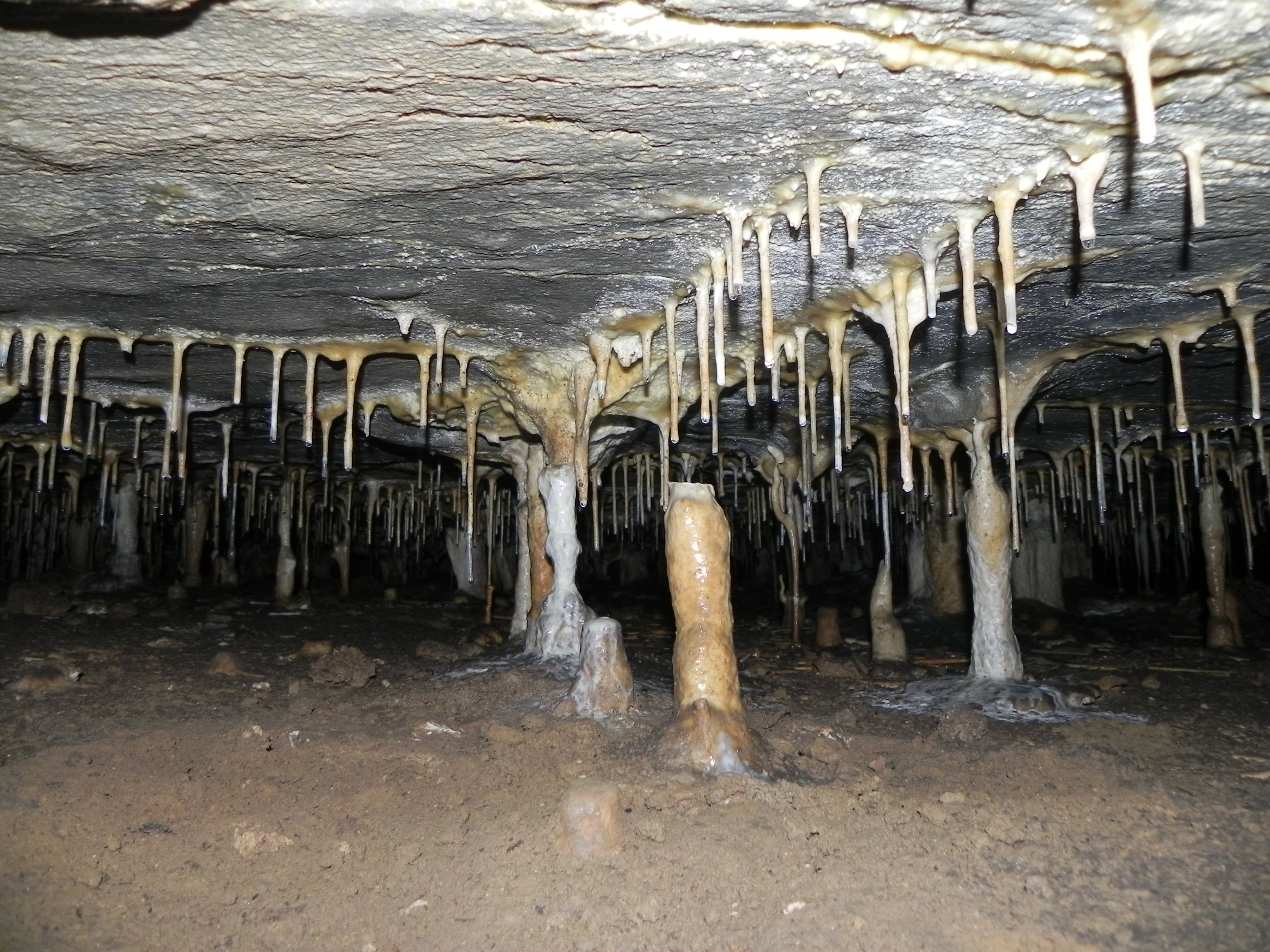 Moravský kras